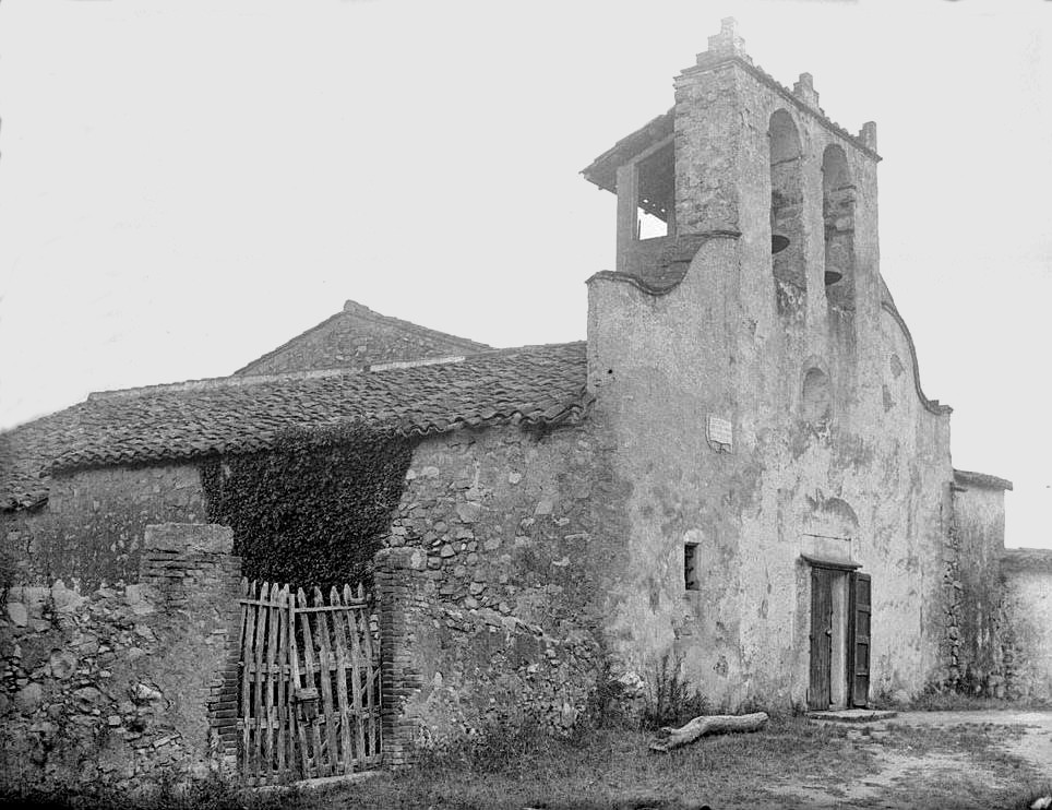 Façana i campanar de Sant Martí de Riells. Enric Ribas i Virgili (Entre 1920 i 1930)